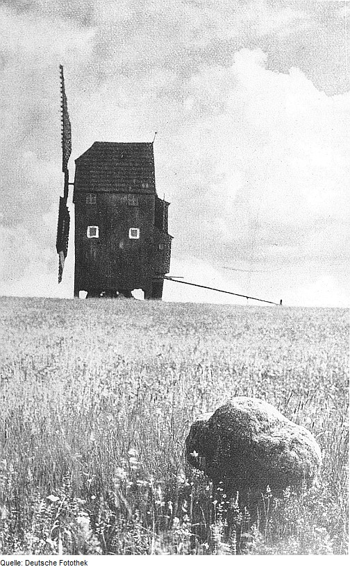 Original image description from the Deutsche FotothekMittelherwigsdorf-Oberseifersdorf. Donixmühle, aus: Kuhfahl, Gustav Adolf: Die alten Steinkreuze im Königreich Sachsen, 1914